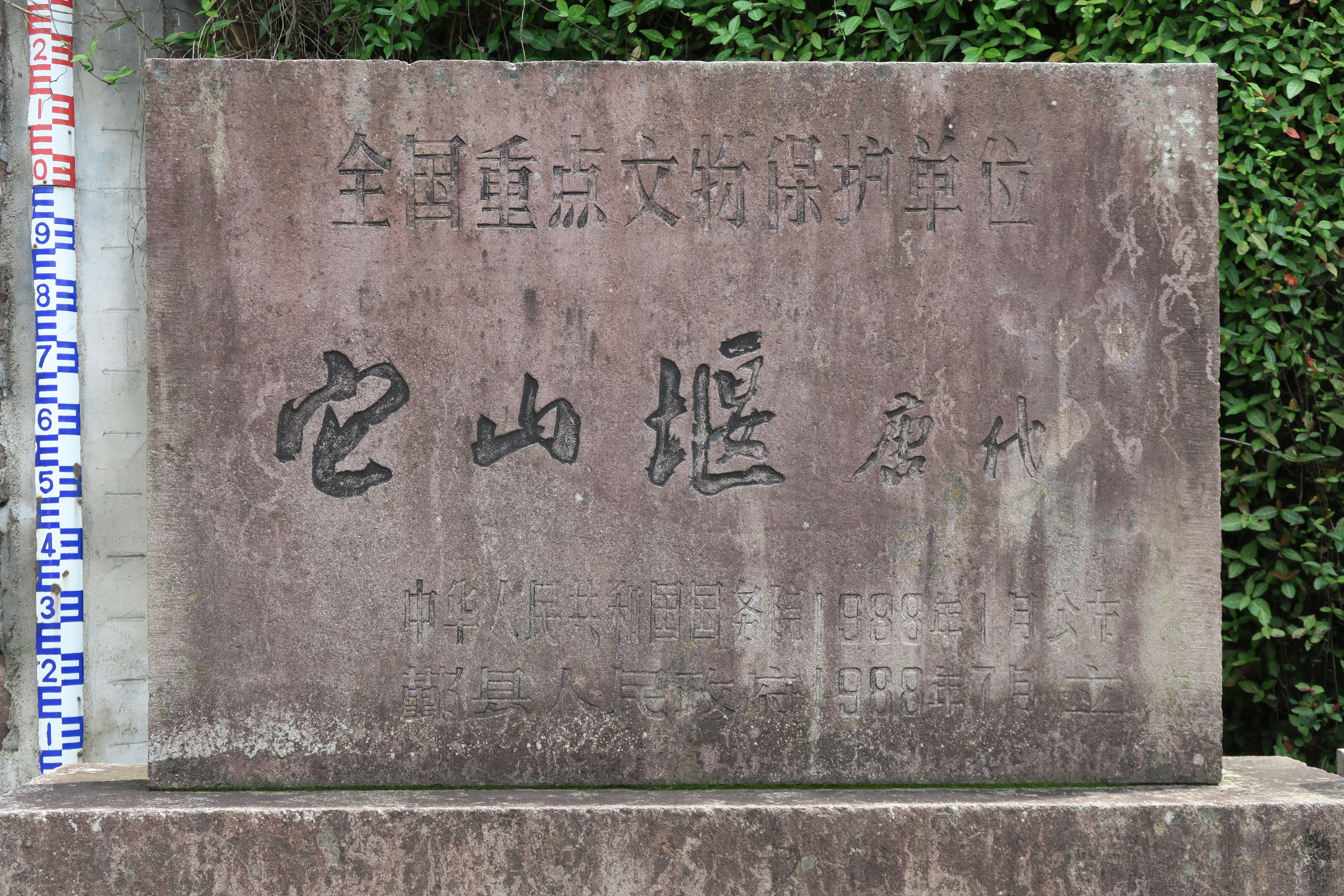 宁波鄞江它山堰